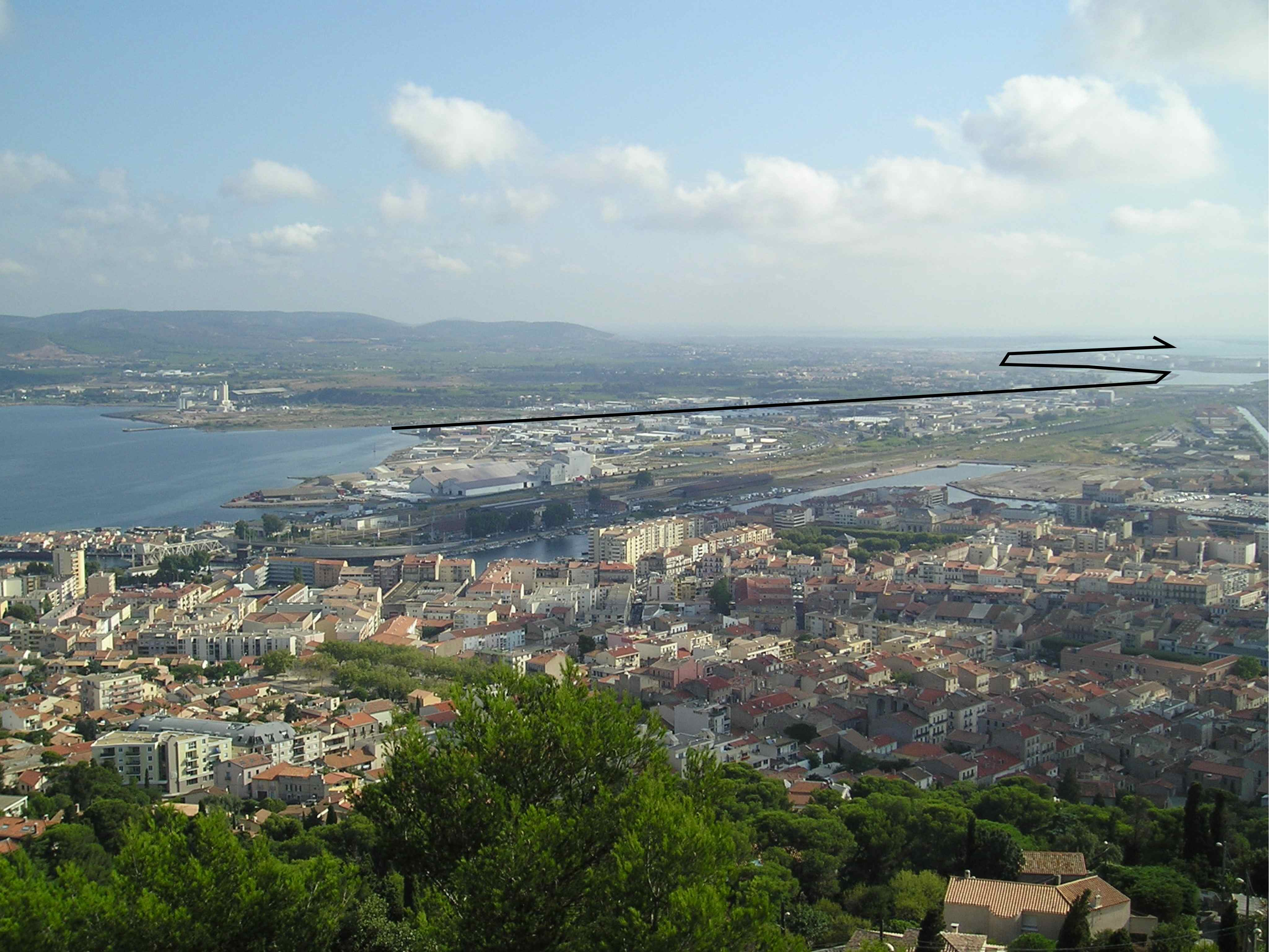 Image:Sete Thau vueStClair 24082007.JPG avec mise en valeur en noir du canal de Rhône à Sète.